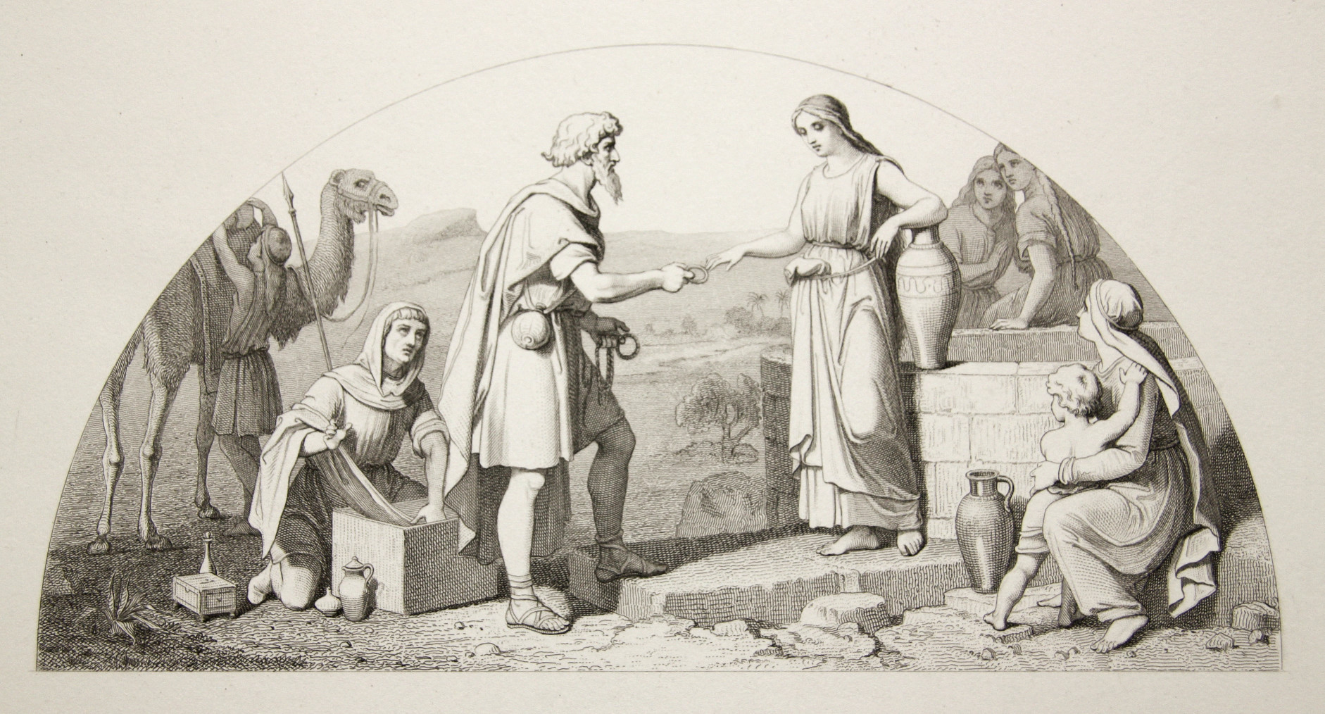 Schloss Schwerin, Kupferstich nach Wilhelm Peters' Wandgemälde Rebecca am Brunnen im Goldenen Saal (zerstört)